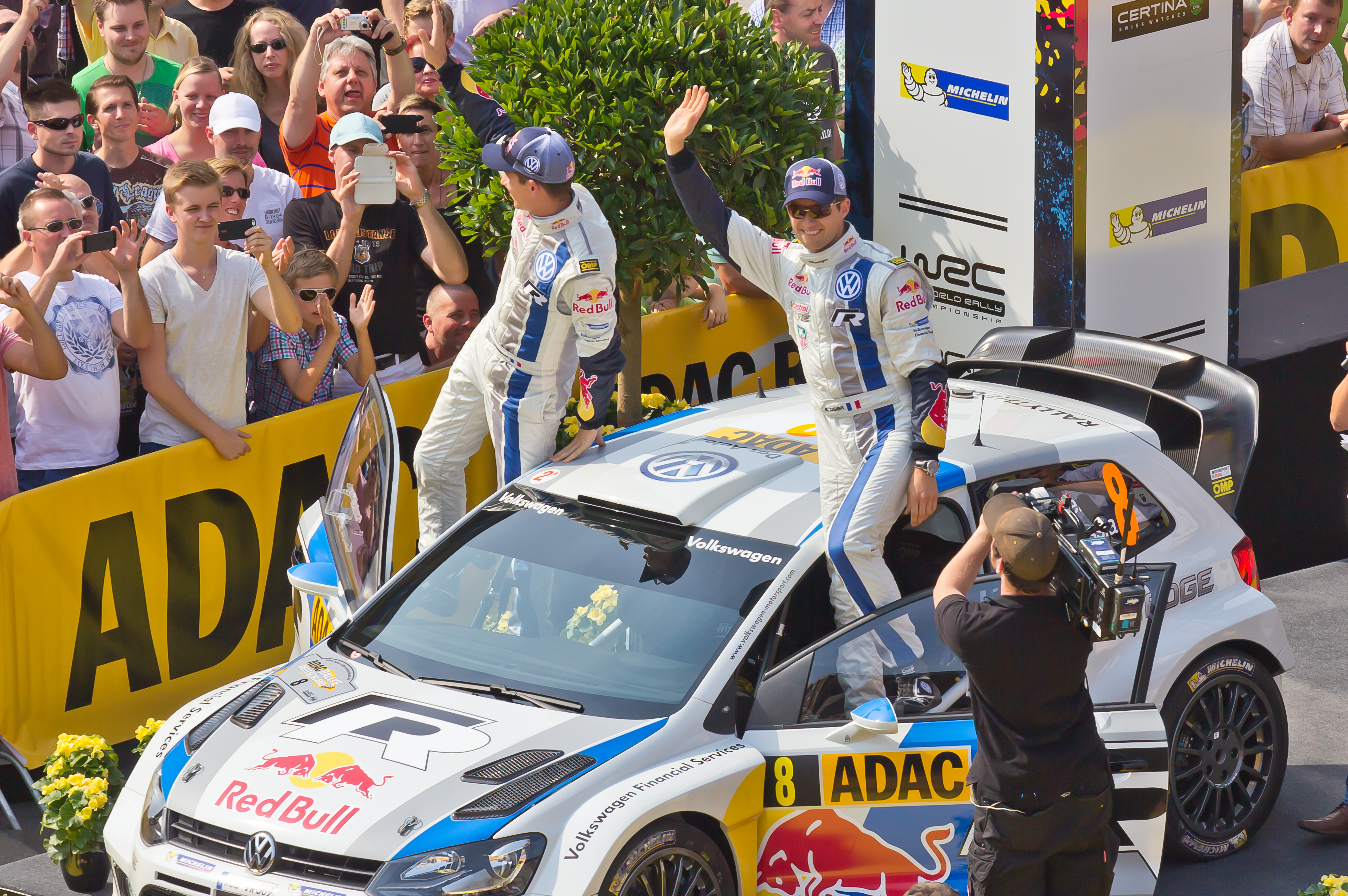 ADAC Rallye Deutschland 2013 - Fahrerpräsentation auf dem Roncalliplatz. Team Volkswagen Motorsport mit dem Fahrer Sébastien Ogier und Co-Fahrer Julien Ingrassia im VW Polo R WRC